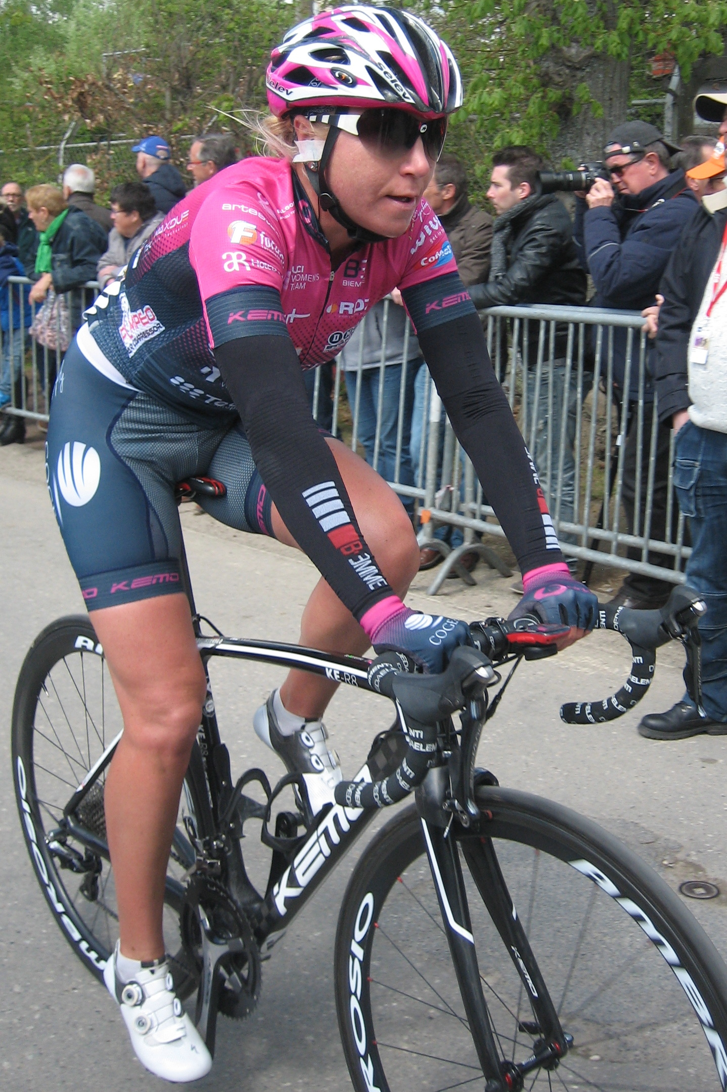 Finish van de Waalse Pijl 2017 in Huy.